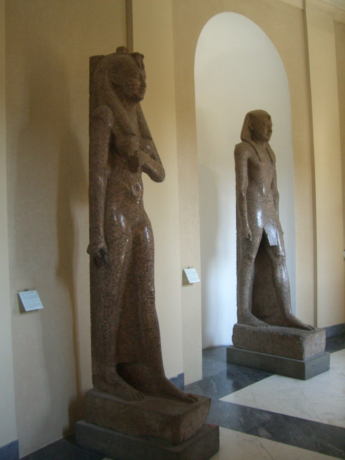 Statues colossales de Ptolémée II et de la reine Arsinoé II - Ensemble statuaire provenant d'Héliopolis - Museo Gregoriano du Vatican - Vatican City